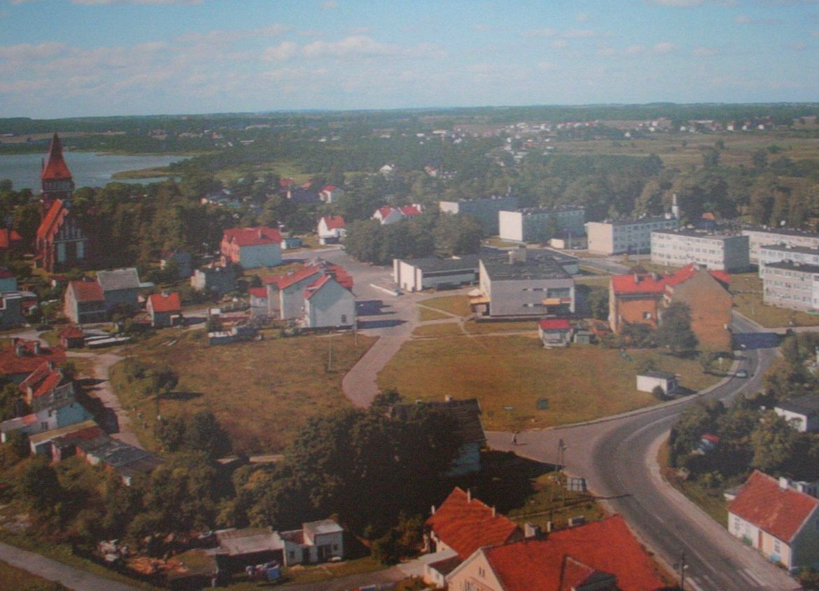 Foto des Ausstellungsrahmens